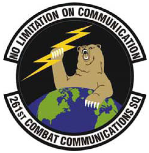 261st Combat Communications Squadron emblem